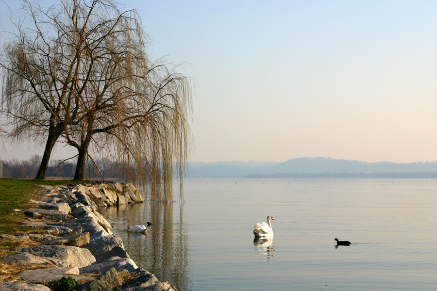 Scorcio del Lago di Varese da Gavirate